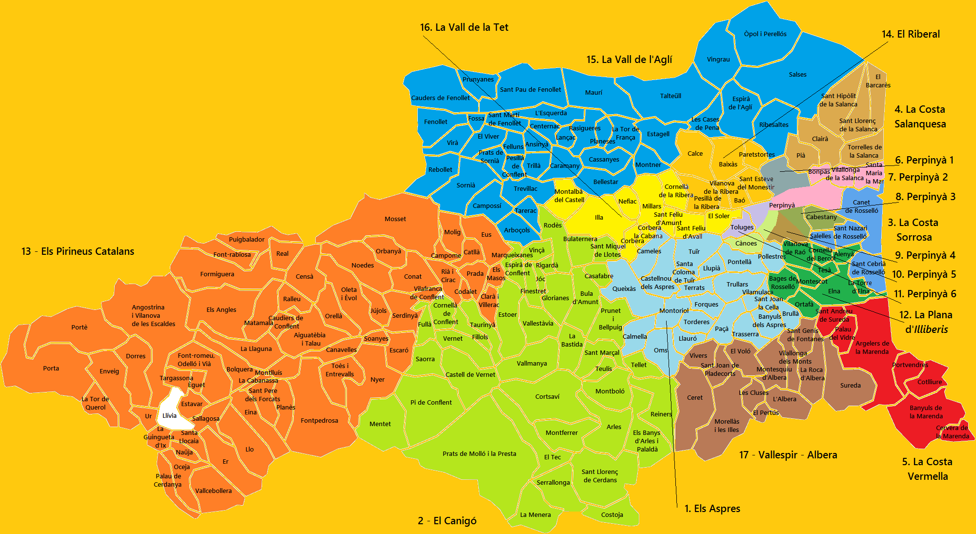 Mapa dels cantons de la Catalunya del Nord elaborat a partir d'un mapa de lliure distribució